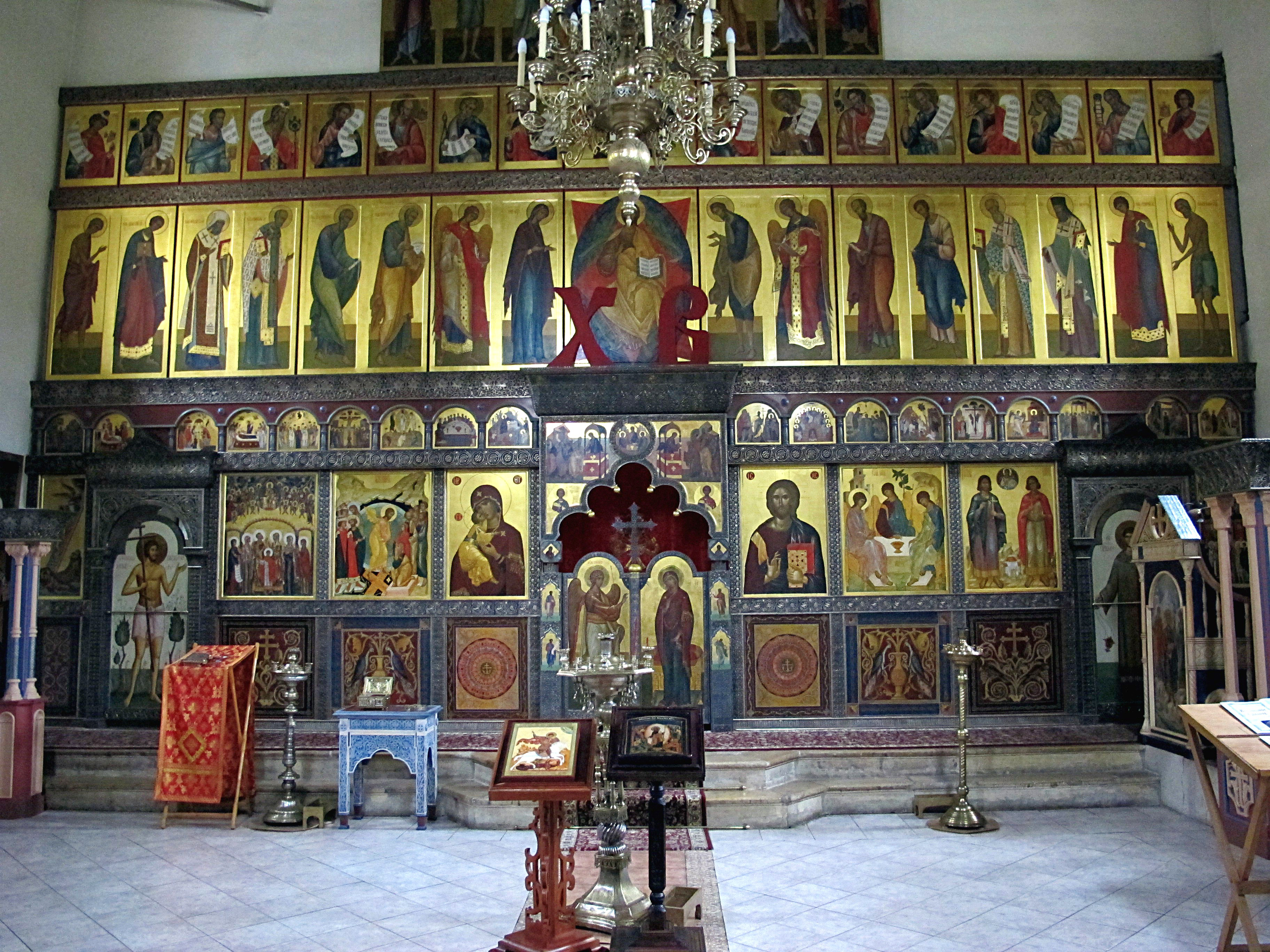 Иконостас "верхнего" придела Храм Трёх Святителей на Кулишках